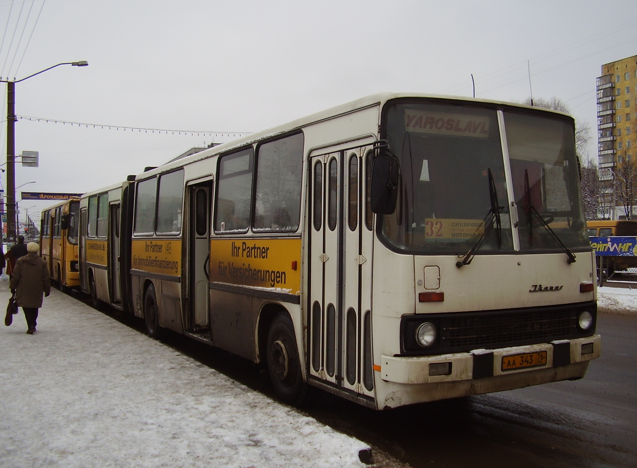 "Икарус-280" в Ярославле, 2006 г.